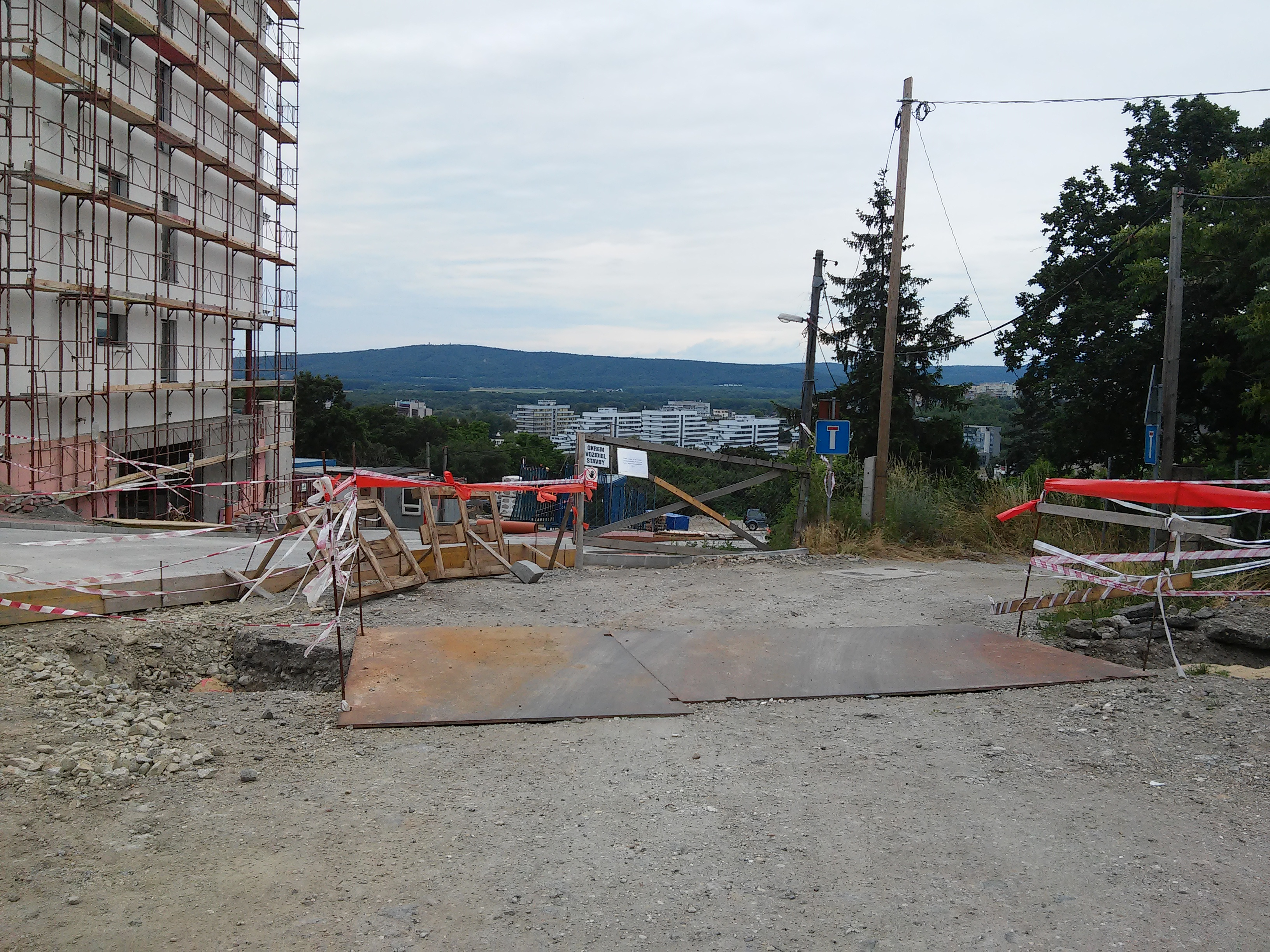 Šafranová, Staré Mesto, Bratislava